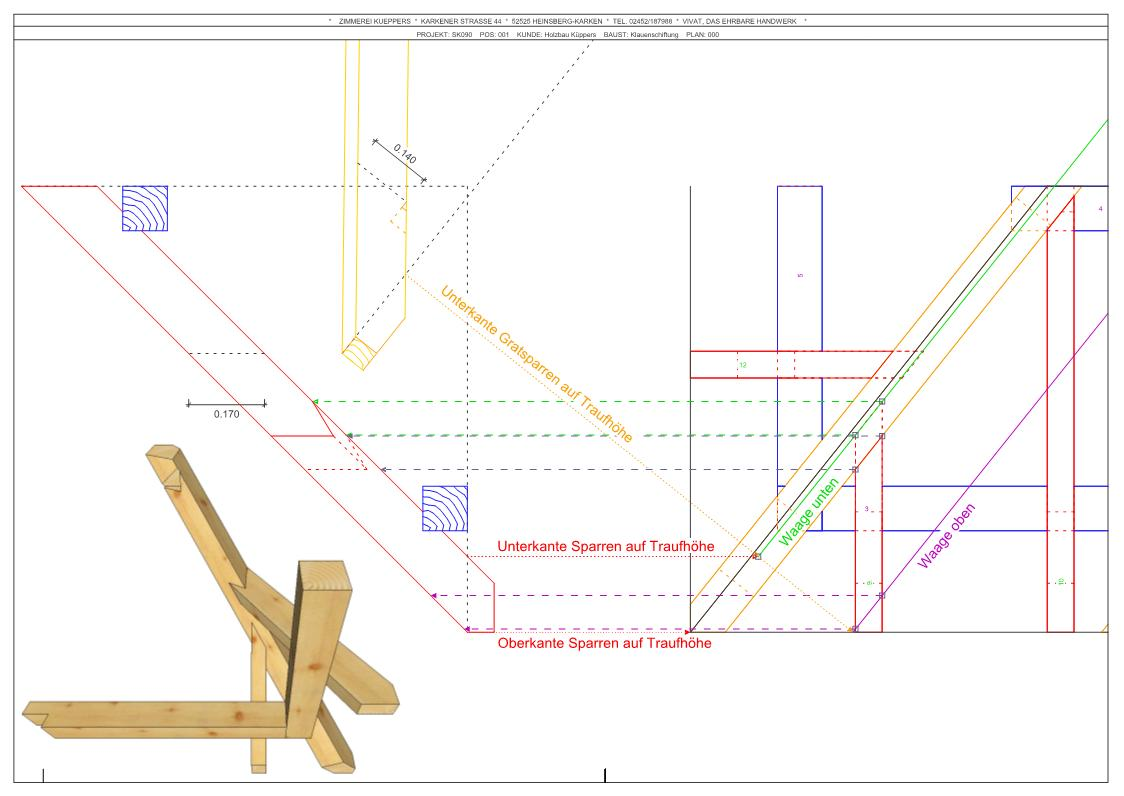 Austragung einer Walmecke mit Gratklaunenschifter